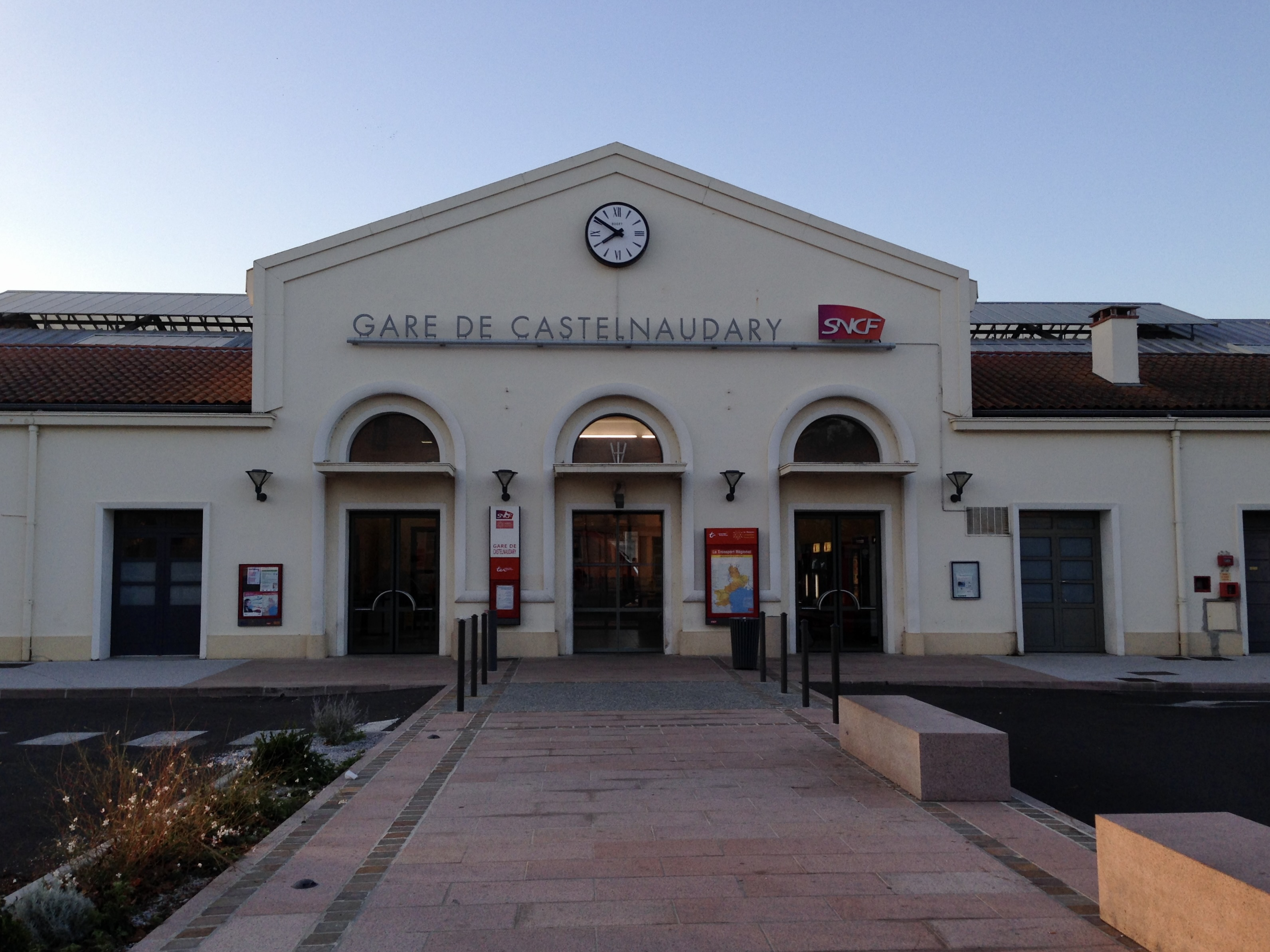 Gare de Castelnaudary (Aude, France).